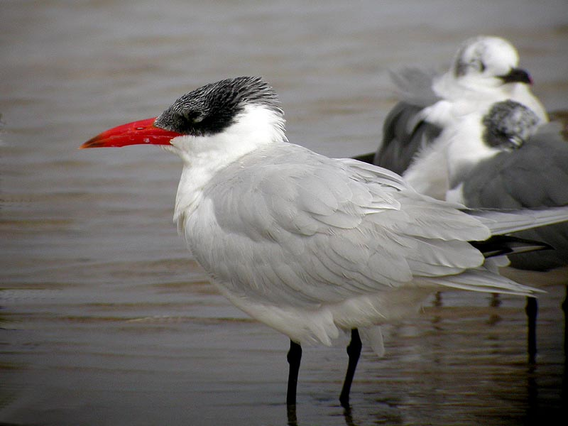 Hydroprogne caspia (syn. Sterna caspia)